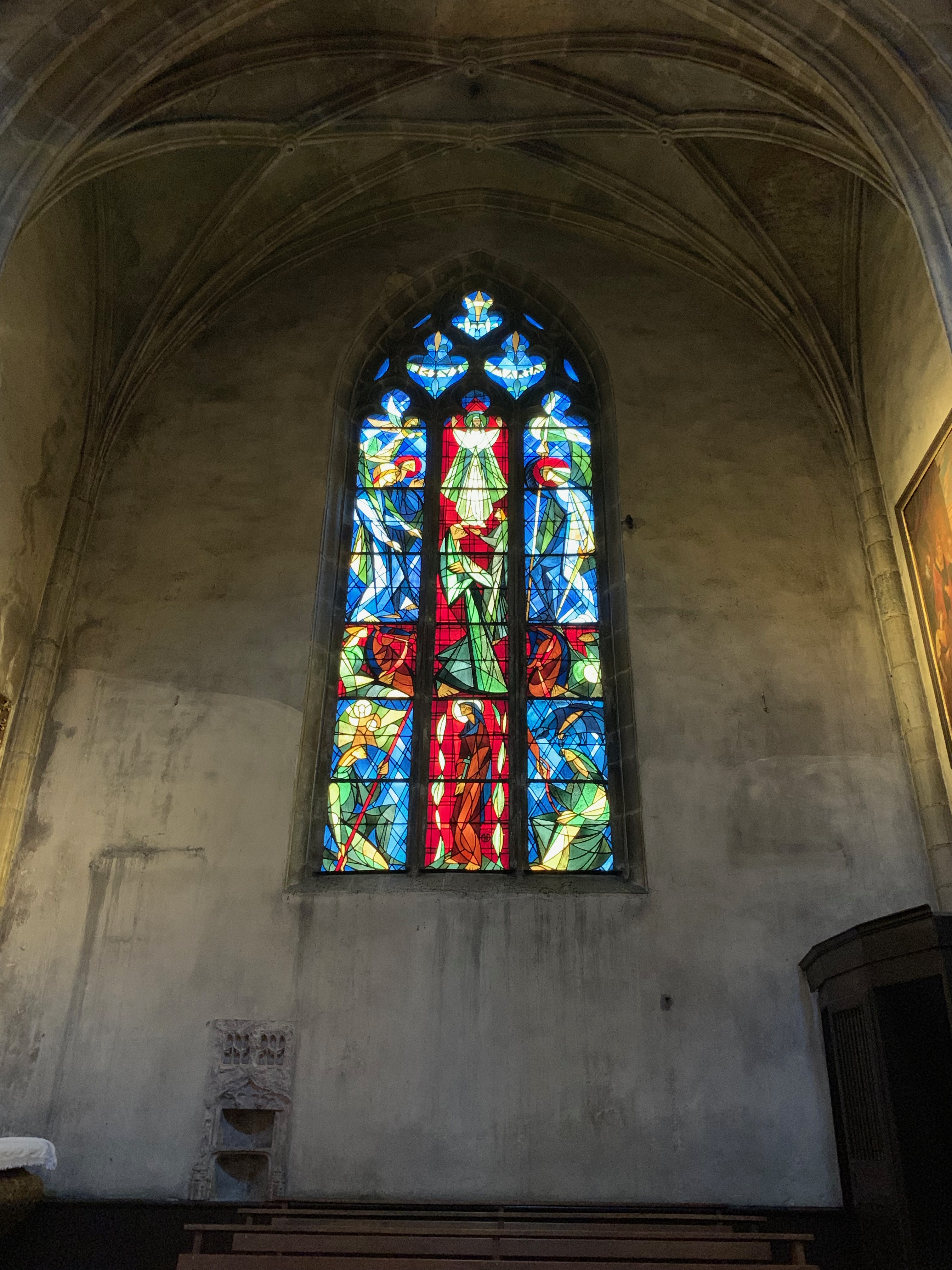 Vitrail représentant la vie de Jeanne d'Arc, à l'intérieur de la co-cathédrale Notre-Dame de l'Annonciation, Bourg-en-Bresse.